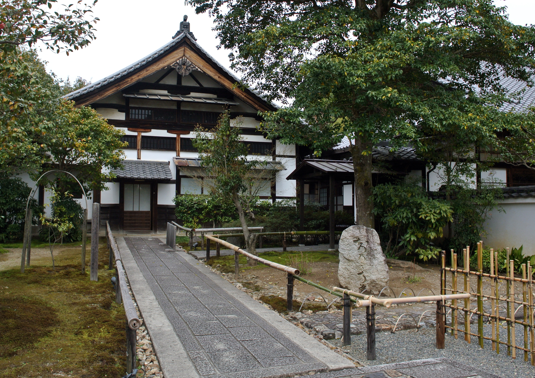 御陵衛士（高台寺党）の屯所・外観